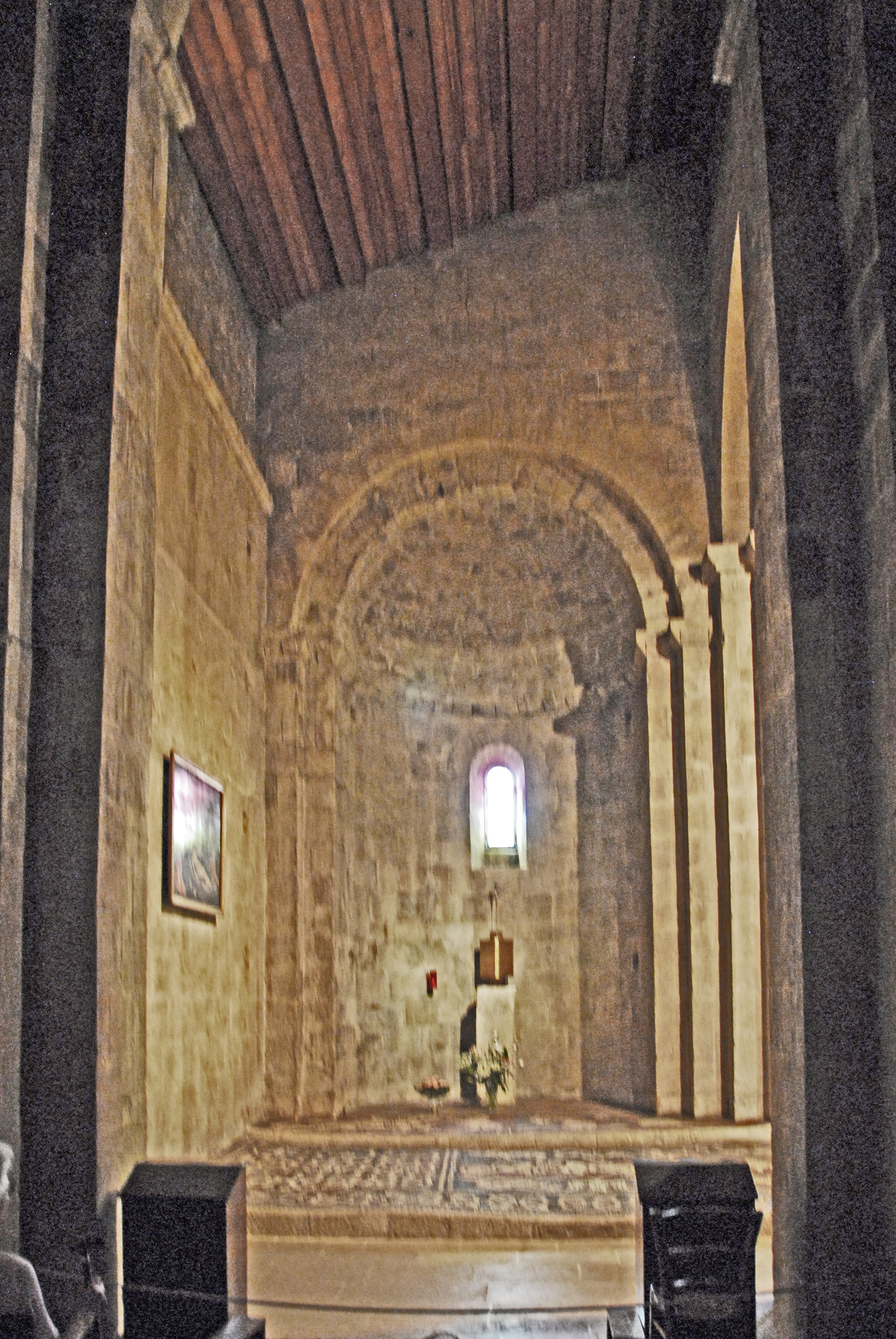 Prieuré de Ganagobie, Nordapsis aus 1.Querschiff